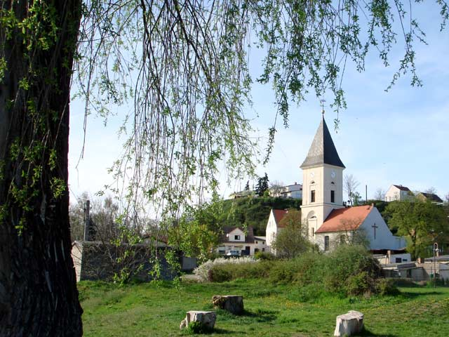 Lebus - Burgberg